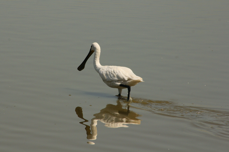 Spatule blanche prise depuis l'observatoire de Demi-Lune dans la Réserve Naturelle des Marais du Vigueirat pendant l'été 2013.